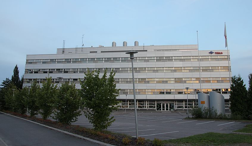 Ohjelmistoyritys Teklan pääkonttori Espoon Pohjois-Tapiolassa (Kehä I:n vieressä). Huom: Muista säilyttää viittaus kuvaajaan, mikäli käytät kuvaa.